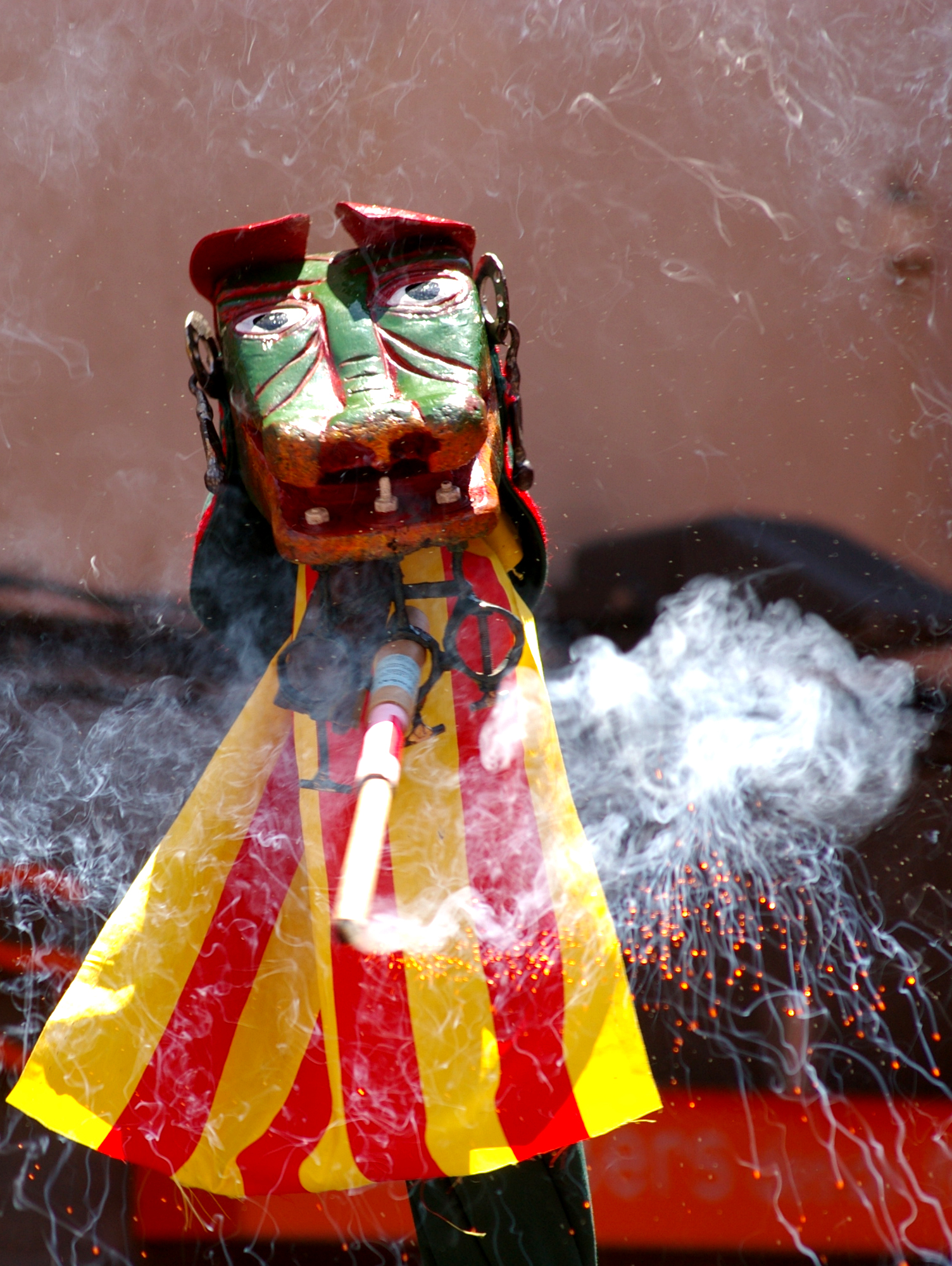 Guita a la Patum Infantil (Berga, Catalunya)